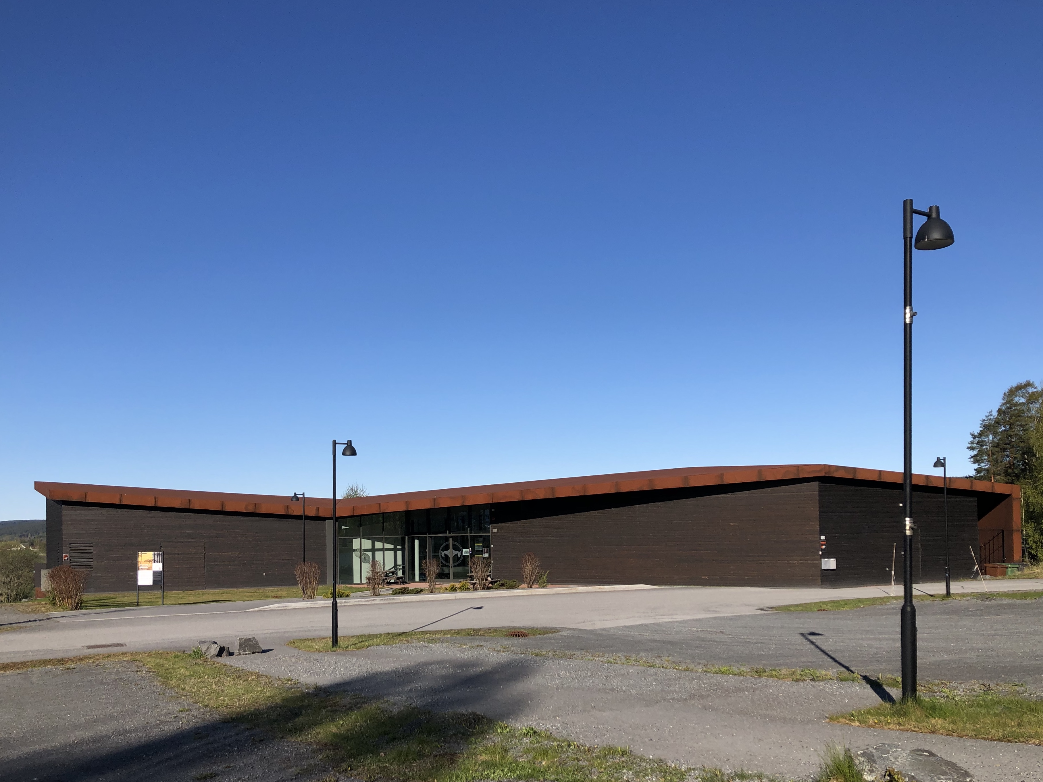 Veien kulturminnepark - Museet, Ringveien 80, Ringerike